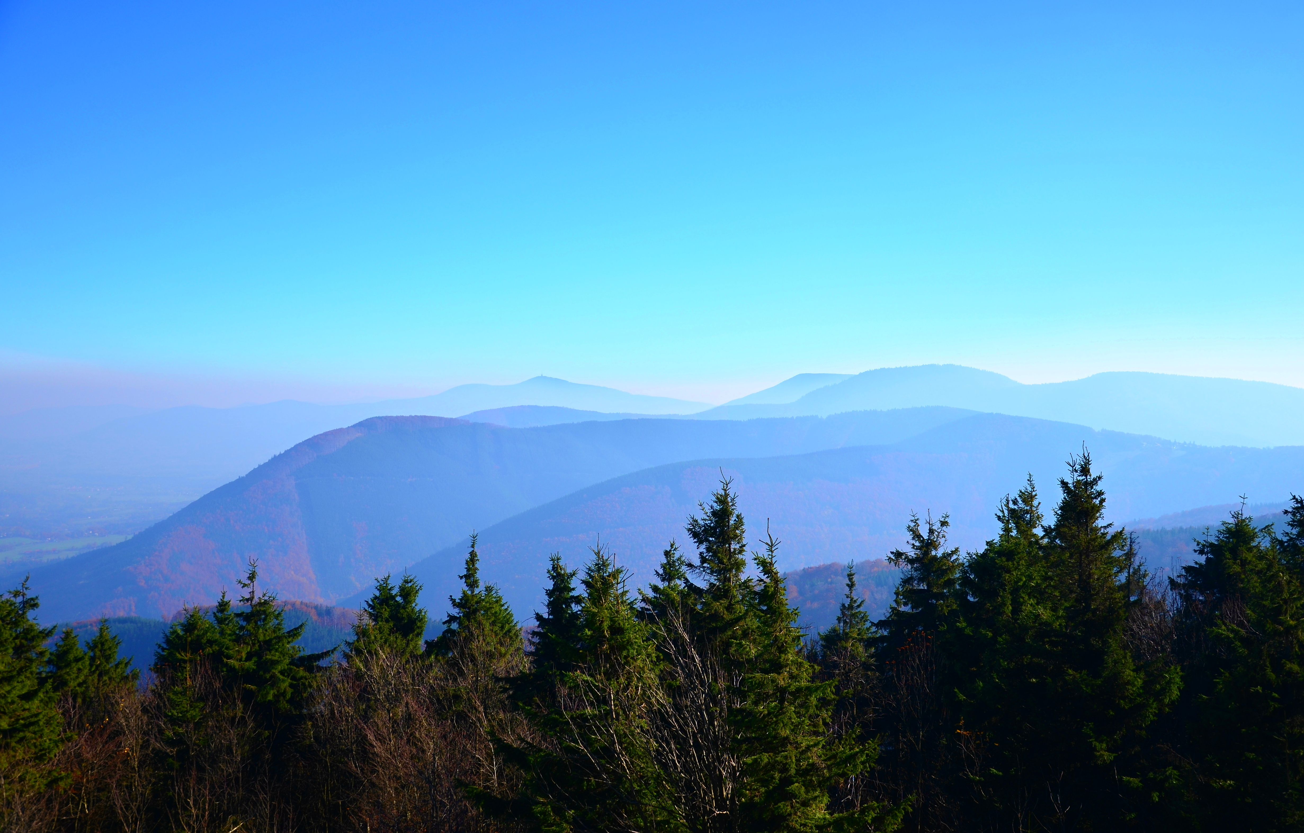 Kaple sv. Cyrila a Metoděje (Dolní Bečva), Radhošť, Dolní Bečva